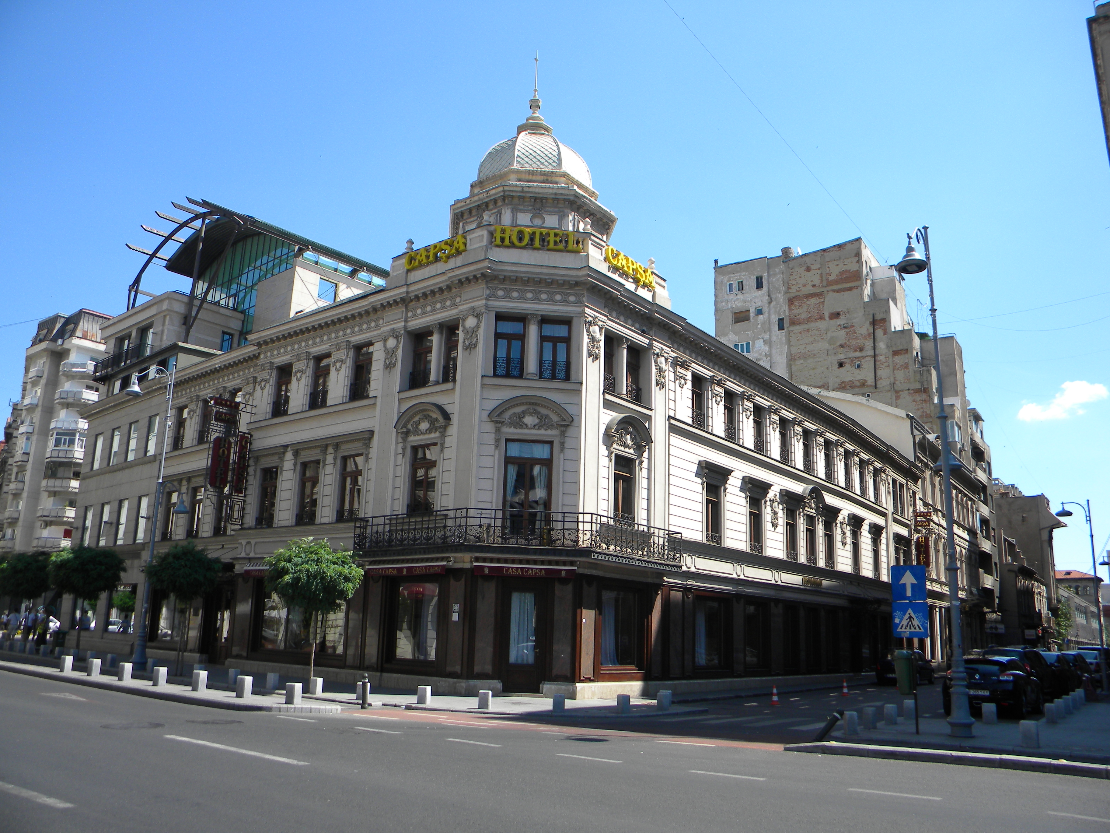 Bucuresti, Romania. Restaurantul CAPSA